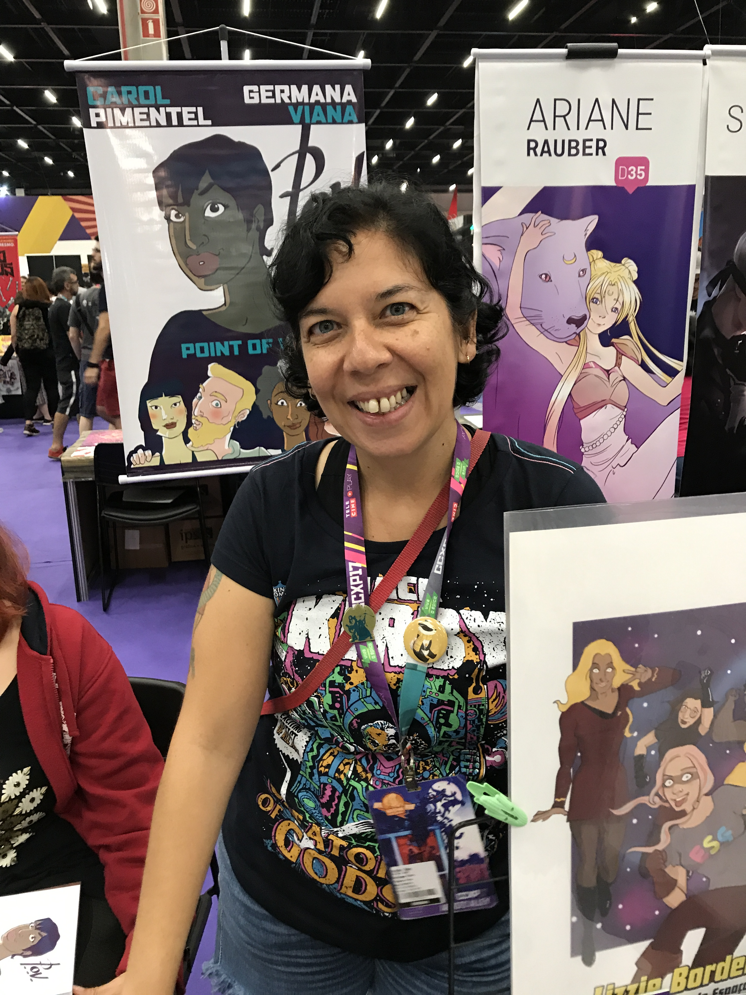 Artista Germana Viana na edição de 2017 da Comic Con Experience